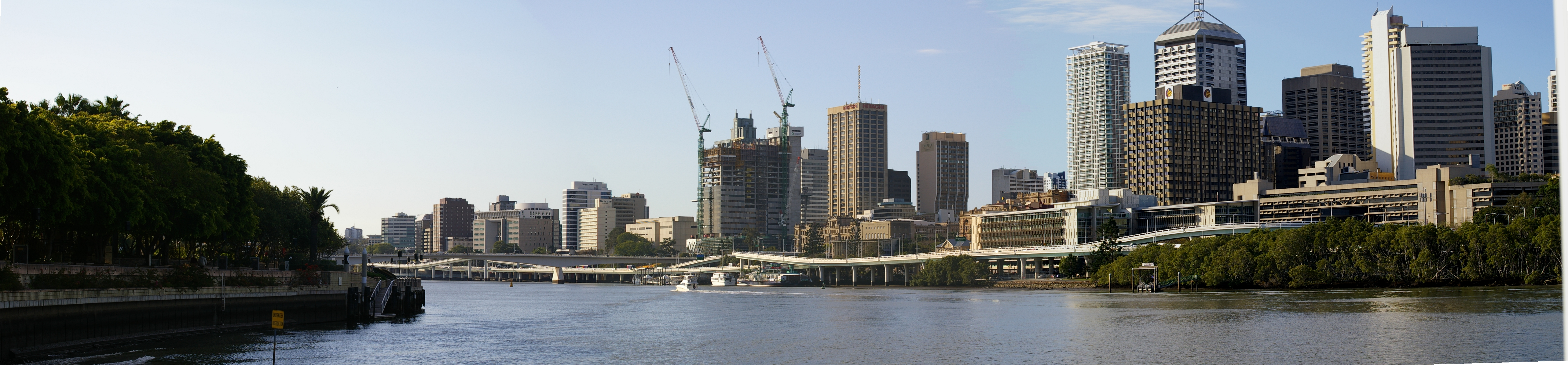 Vue panoramique de Brisbane, au Queensland, en Australie